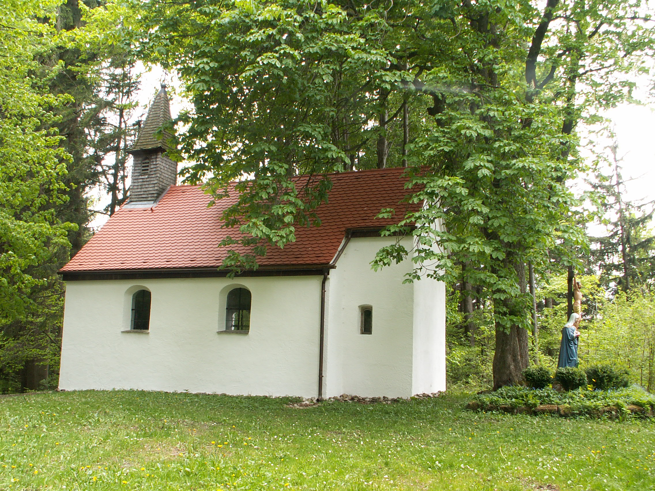 Kalvarienbergkapelle in Rott